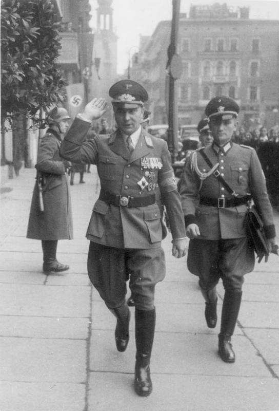 Befreiungsfeier des Warthegaues in Posen. Reichsstatthalter und Gauleiter Greiser in Posen. 2.10.39 Bildb. Haine